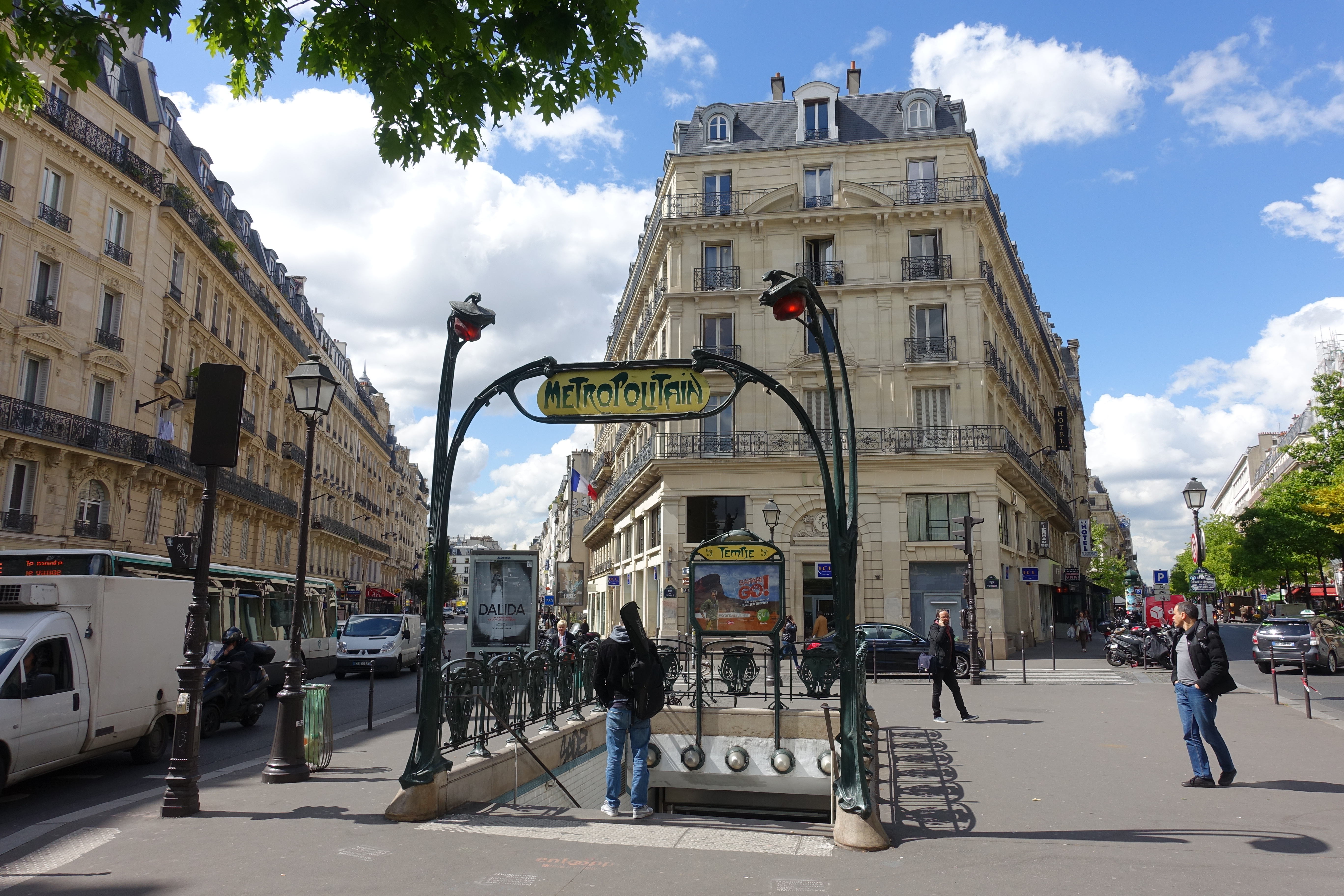 Temple metro station @ Paris